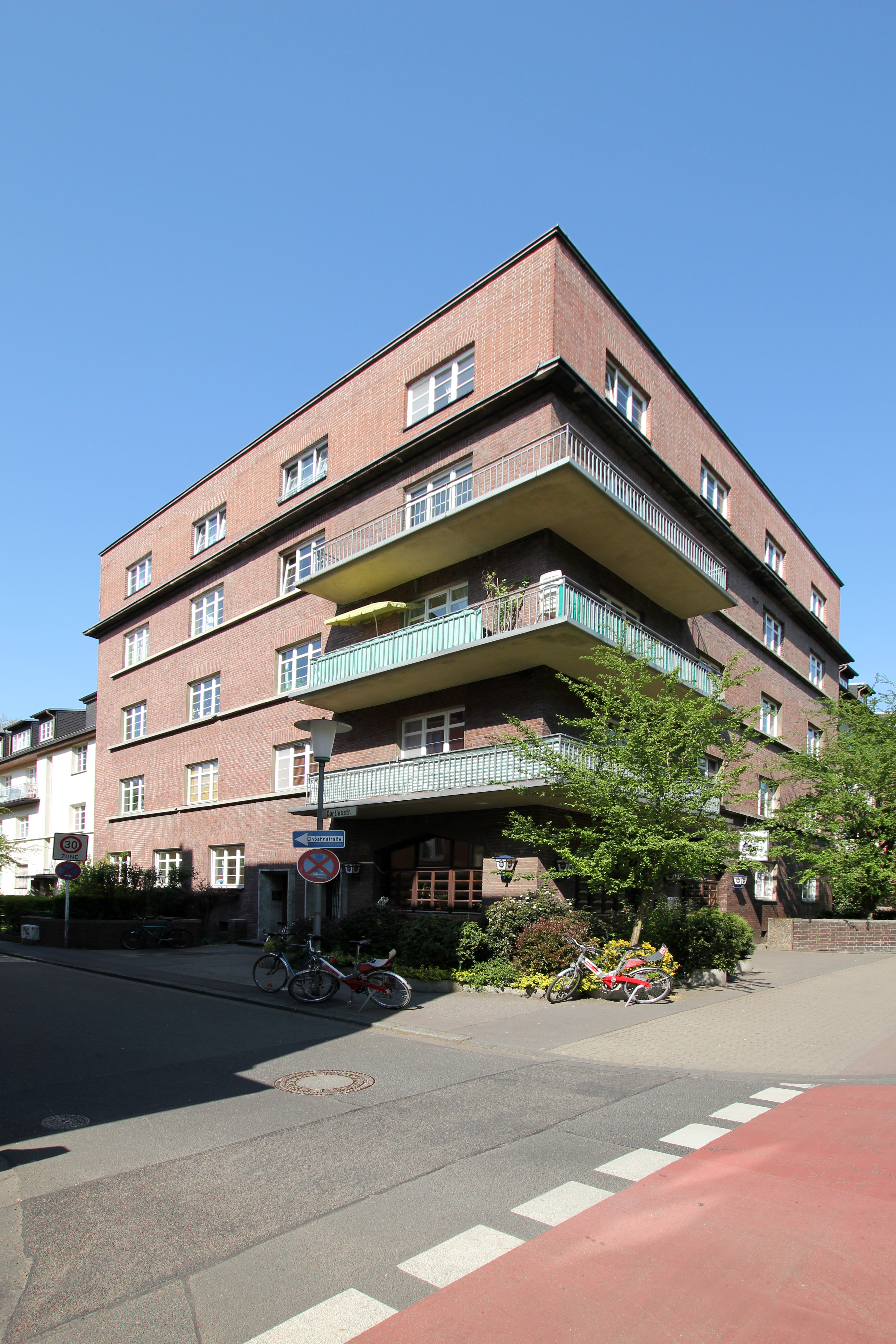 Köln-Sülz, Curtiusstraße 2